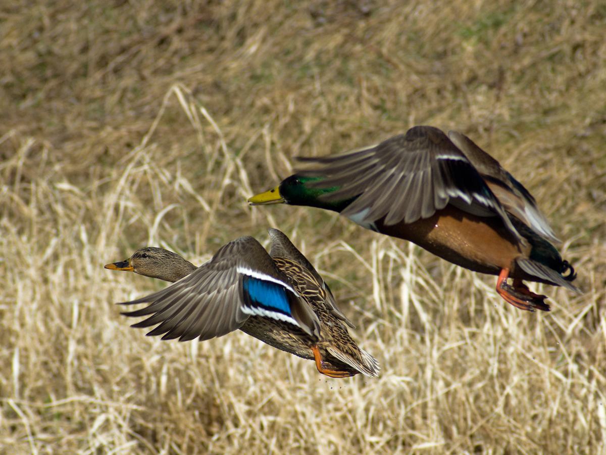 Kaczki krzyżówki napotkane na spacerze we Wrocławiu.